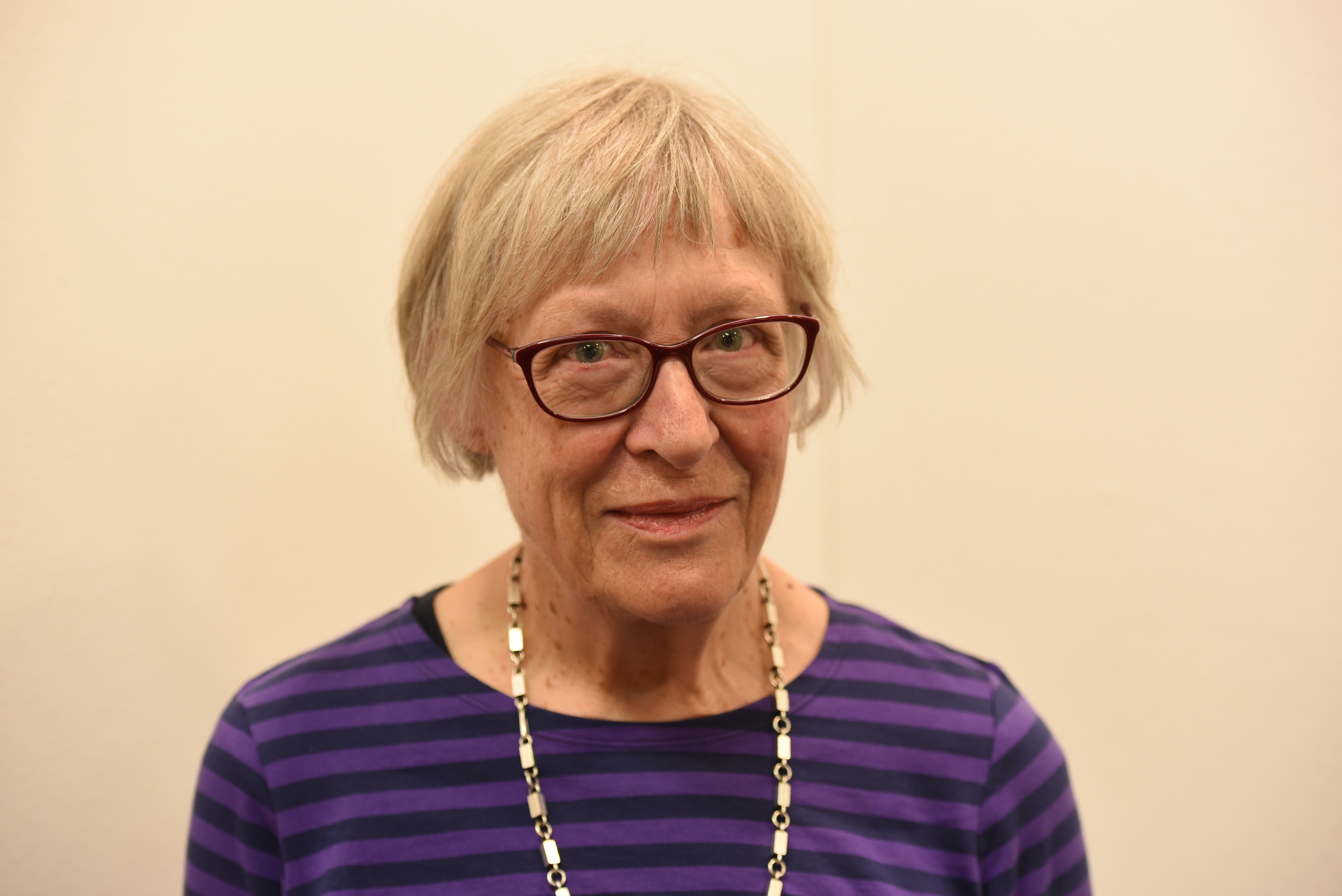 Författaren, litteraturkritikern, översättaren och ledamoten av Samfundet De Nio Madeleine Gustafsson på Bokmässan i Göteborg 2017.